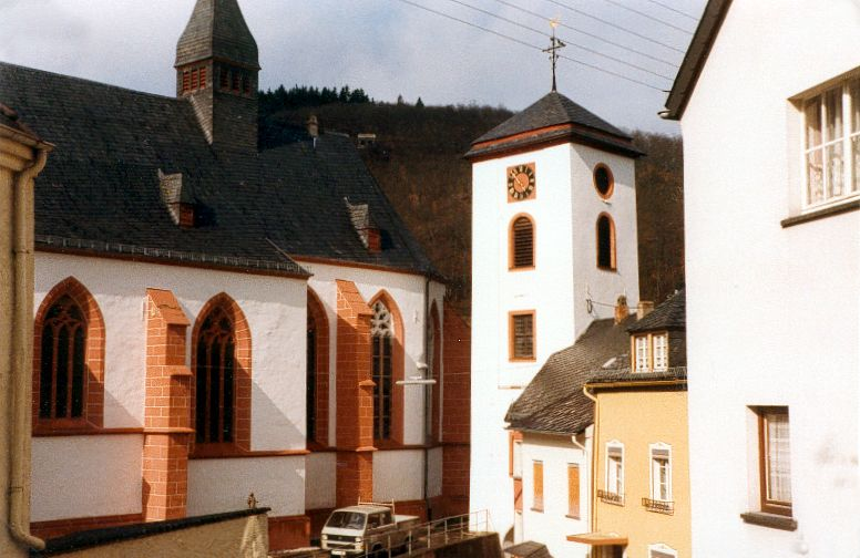 St. Nikolaus Glockenturm - früher Torturm